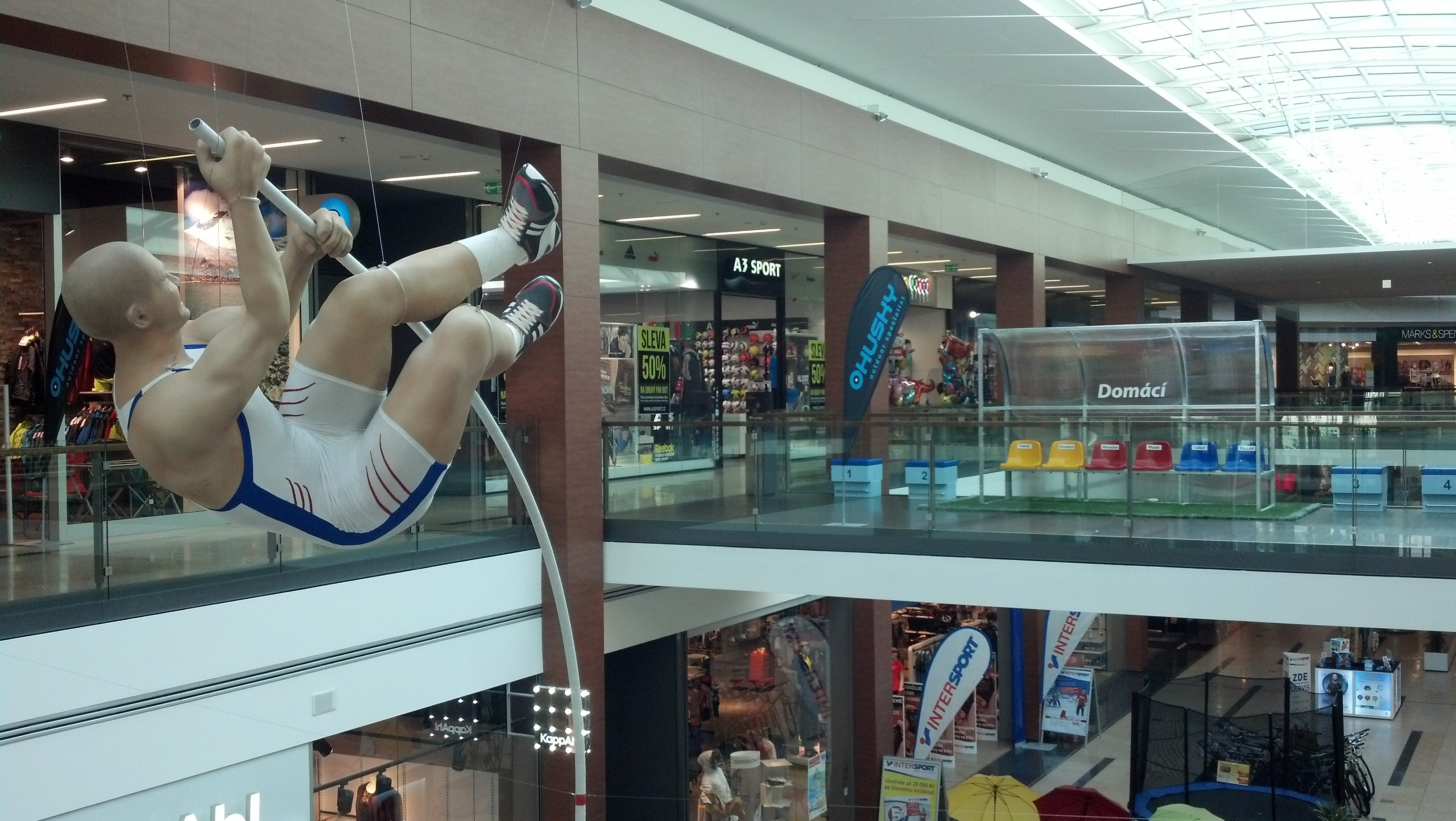 Galerie Harfa - vnitřní výzdoba